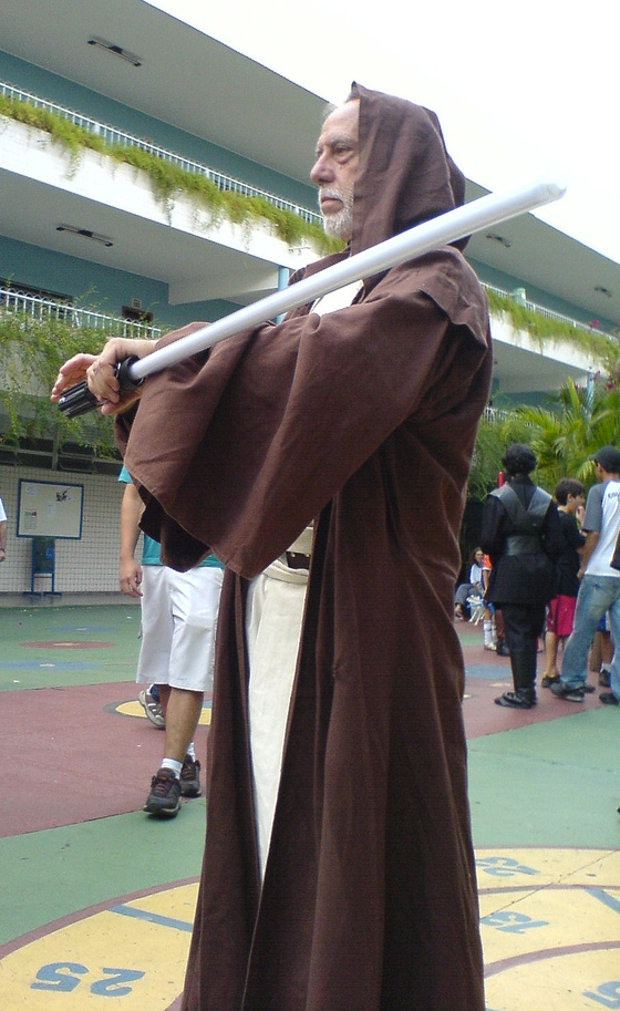 Brincando de amarelinha.